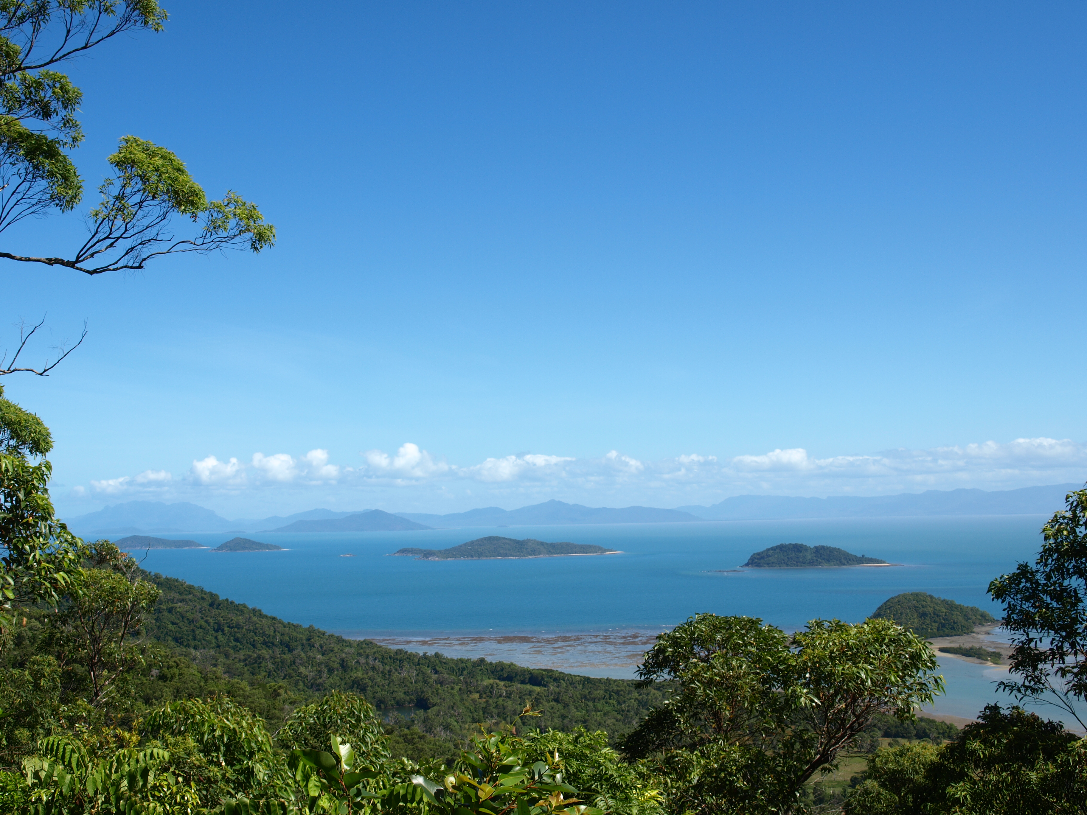 Blick vom Mount Kootaloo (Dunk Island) Richtung Süden. Man erkennt einige Inseln der Family Islands. Im Vordergrund die Bedarra Islands.